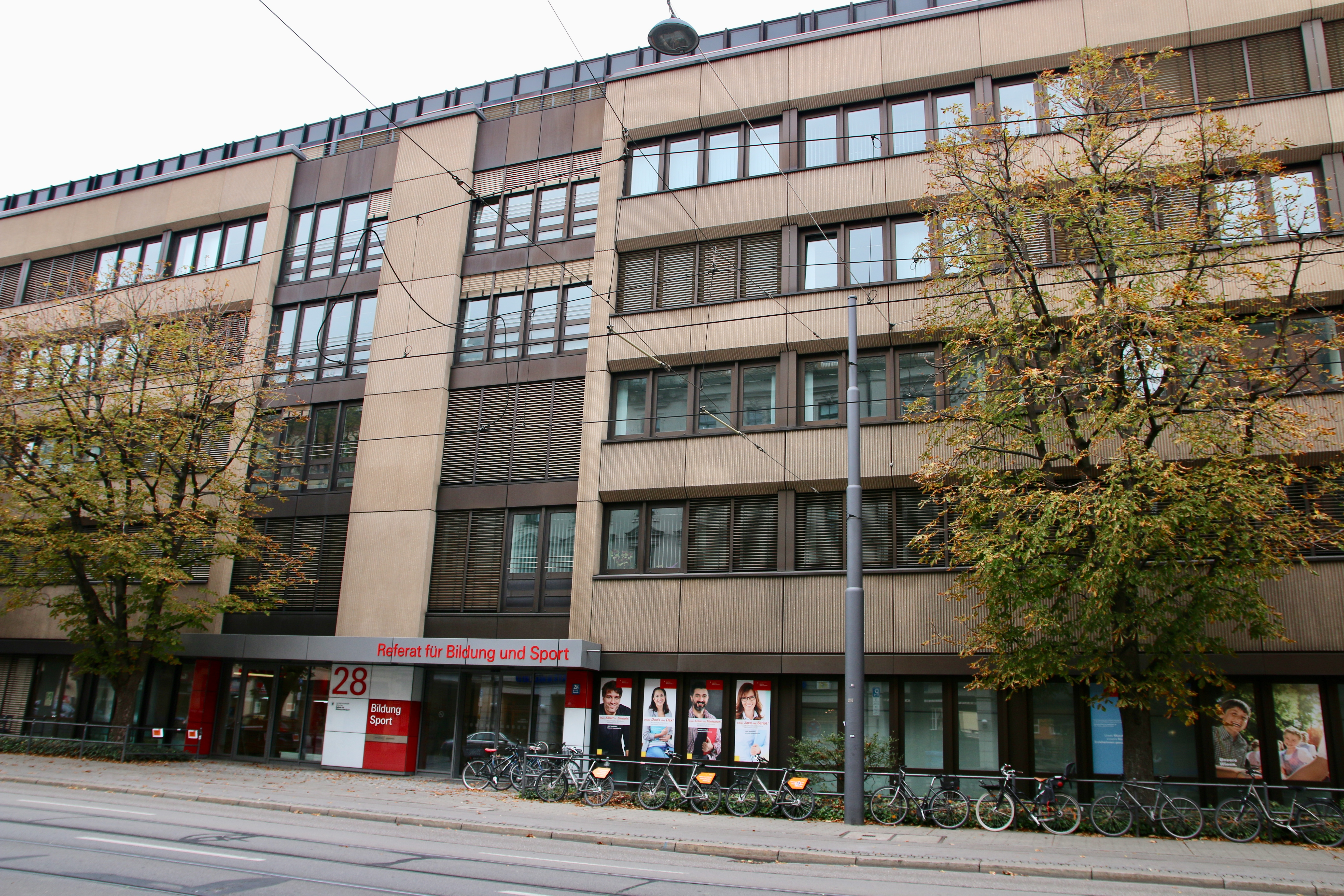 Das Gebäude in der Bayerstraße 28 in München mit verschiedenen Verwaltungsräumen der Stadt München, insbesondere das Referat für Bildung und Sport.